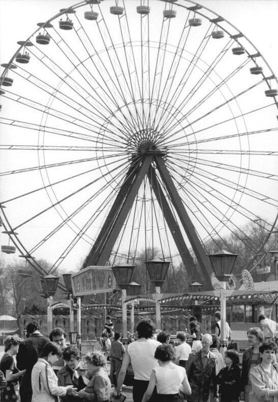 ADN-ZB-Franke-5.4.85-Berlin: Kulturpark - Mit Riesenrad und Karussells lädt der Berliner Kulturpark wieder zum Vergnügen ein. Bei der Eröffnung standen 50 Karussells und Schaugeschäfte für Fahrten, Geschwindigkeits- und Krafttests sowie andere Belustigungen zur Verfügung. (siehe 22 und 23 N)